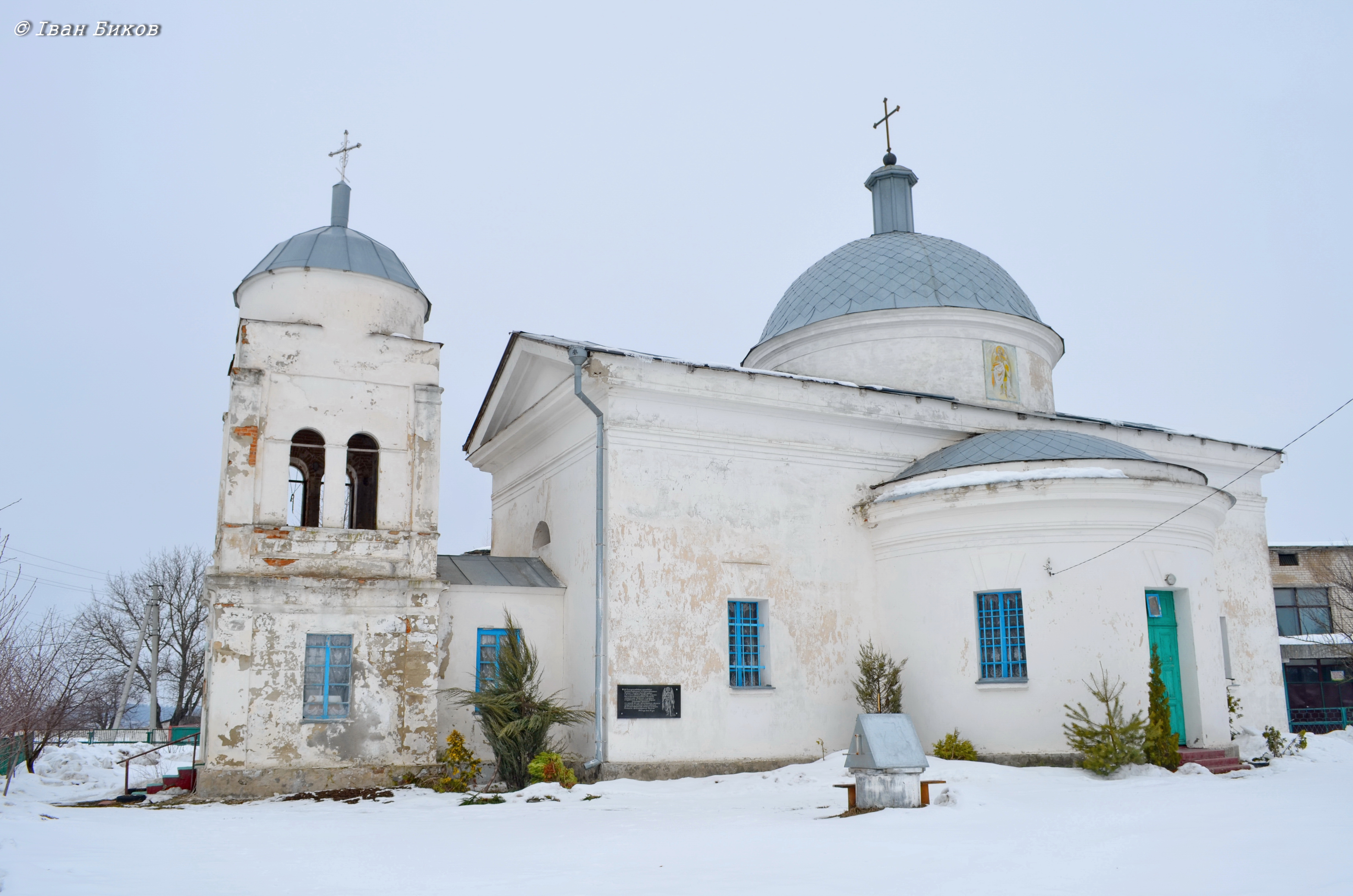 Михайлівська церква (мур.), село Пилипівка